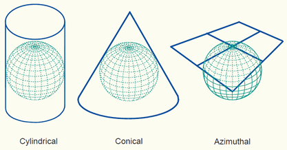 Kolm projektsiooni põhiklassi: silindriline, koonus ja tasandiline.